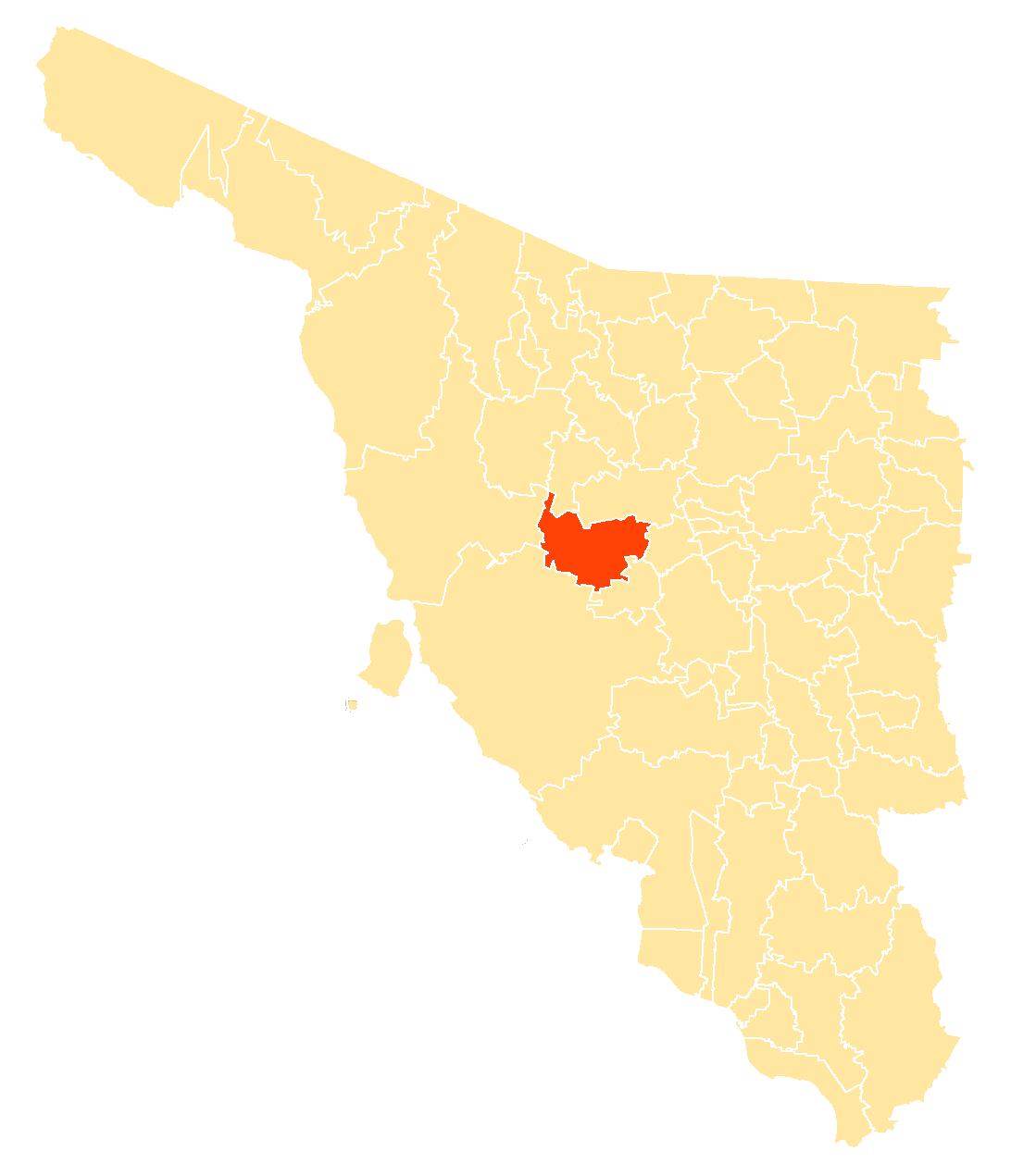 Municipio en Sonora, México.